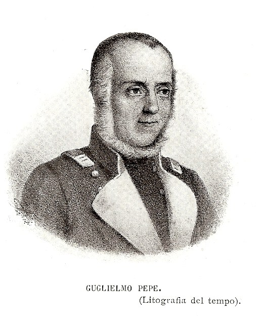 L'immagine si trova nel libro: I liberatori-Glorie e figure del Risorgimento, scritto da Pasquale de Luca e stampato dall'Istituto Italiano d'Arti grafiche nel 1909 a Bergamo